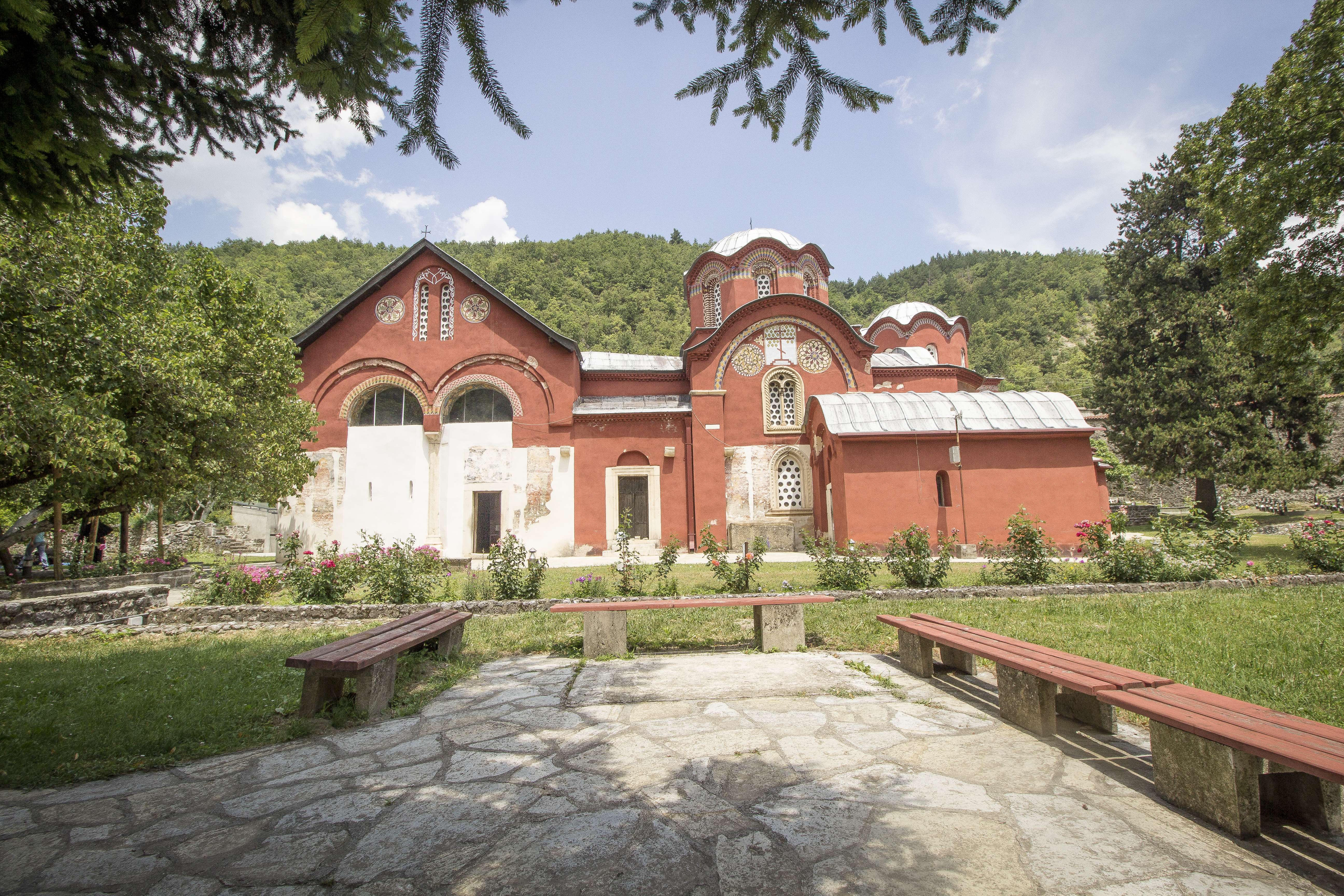 Klášter v Peći